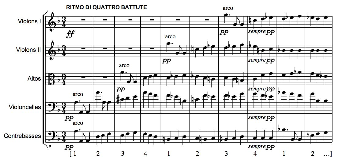 Beethoven, 9e symphonie, 2me mouvement, strette